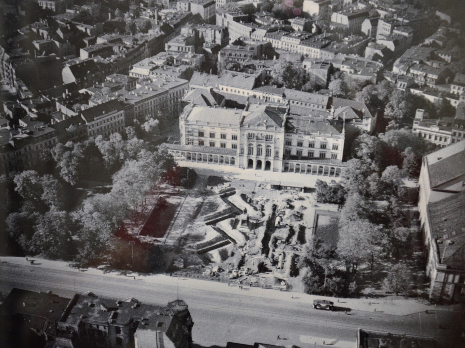 Bau des Lasch-Bunkers vor der Albertus-Universität Königsberg